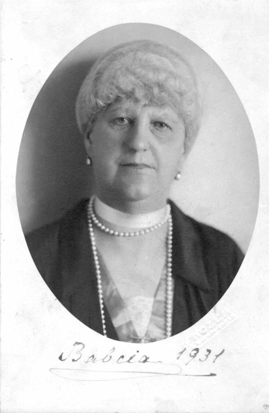 Marii Teresy Habsburg-Toskańskiej (1862-1933).